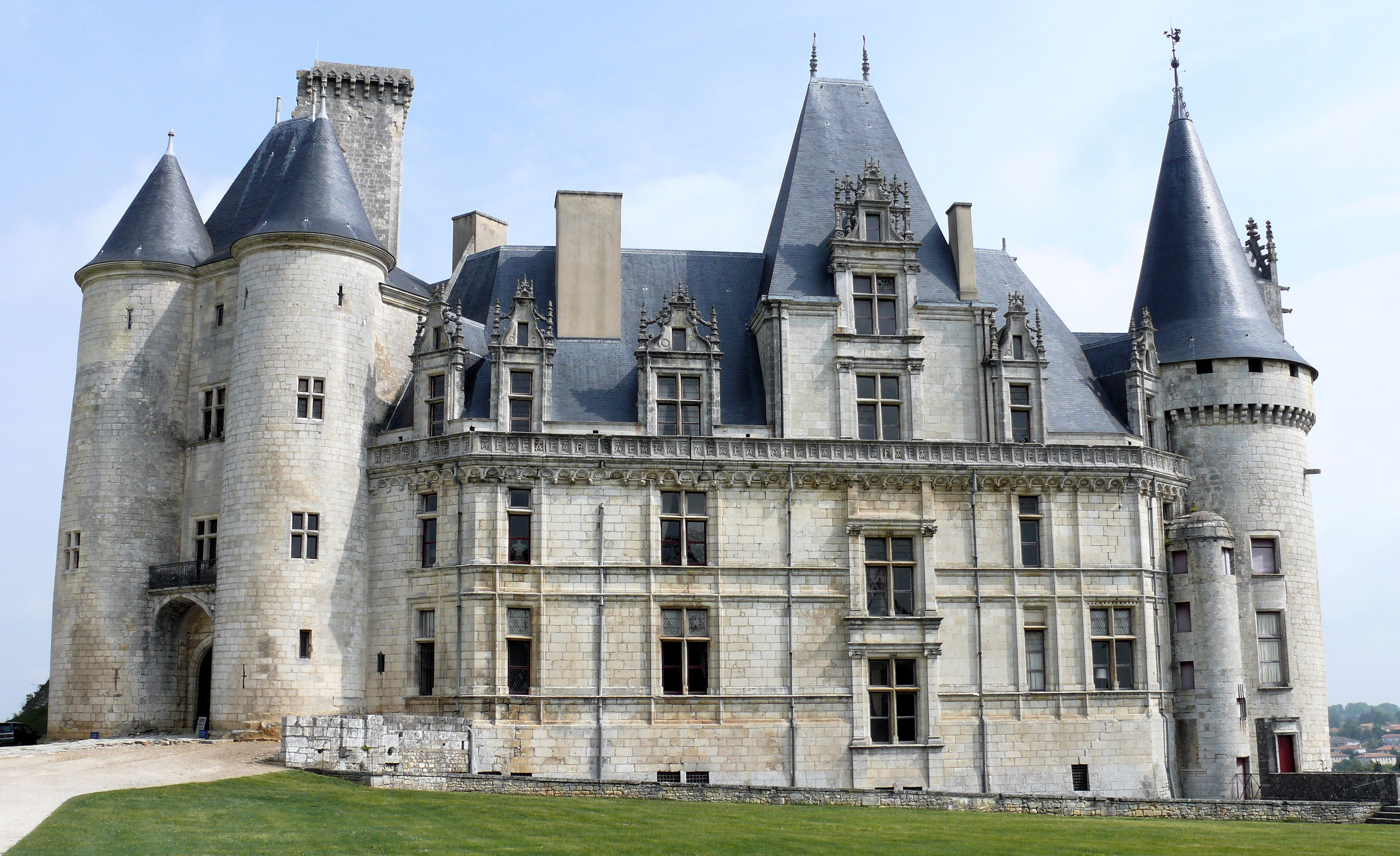 Château de La Rochefoucauld - Aile Sud Reanissance, entre le châtelet et la tour des Archives